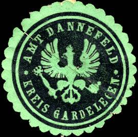 Sealing stamp Title: Amt Dannefeld - Kreis Gardelegen Description: schwarz, grün, geprägt Place: Dannefeld size: 3 cm